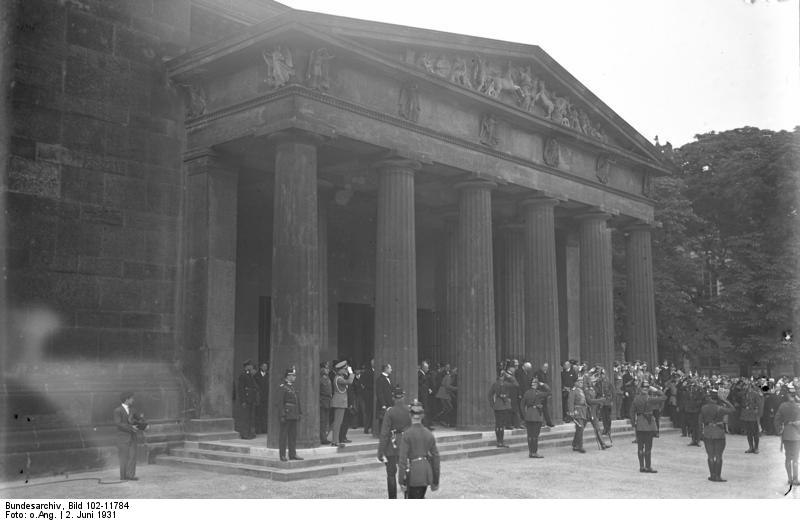 Die feierliche Einweihung des Preussischen Ehrenmals Unter den Linden in Berlin! wurde durch den Reichspräsidenten von Hindenburg und den Mitglieder der Reichs- und Staats-Regierung am 2. Juni d.J. vollzogen. Reichspräsident von Hindenburg verlässt mit seinem Sohn und dahinter der preussische Innenminister Dr. Braun das Ehrenmal Unter den Linden nach der feierlichen Einweihung.